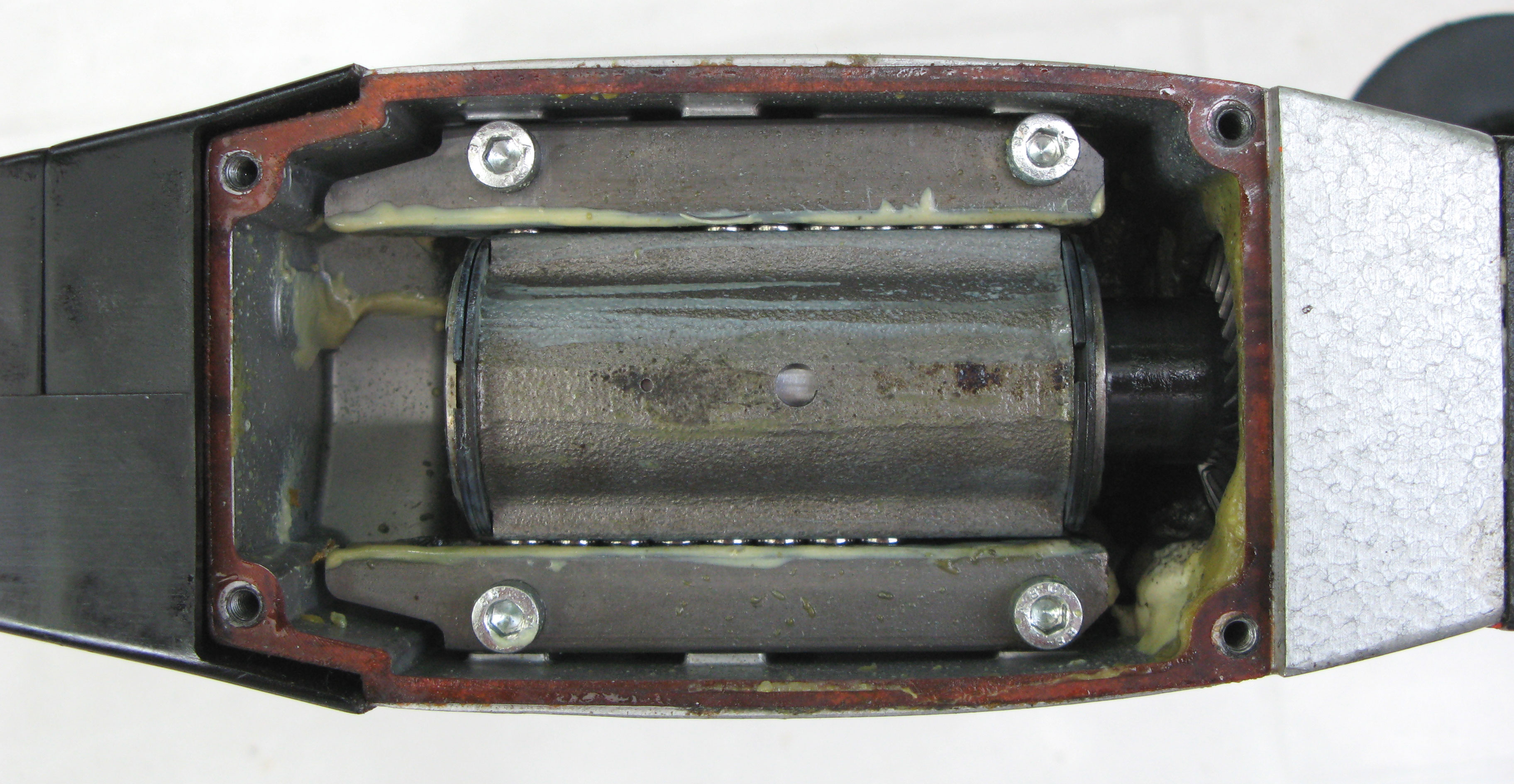 De Schlagzylinder vum Buerhummer.